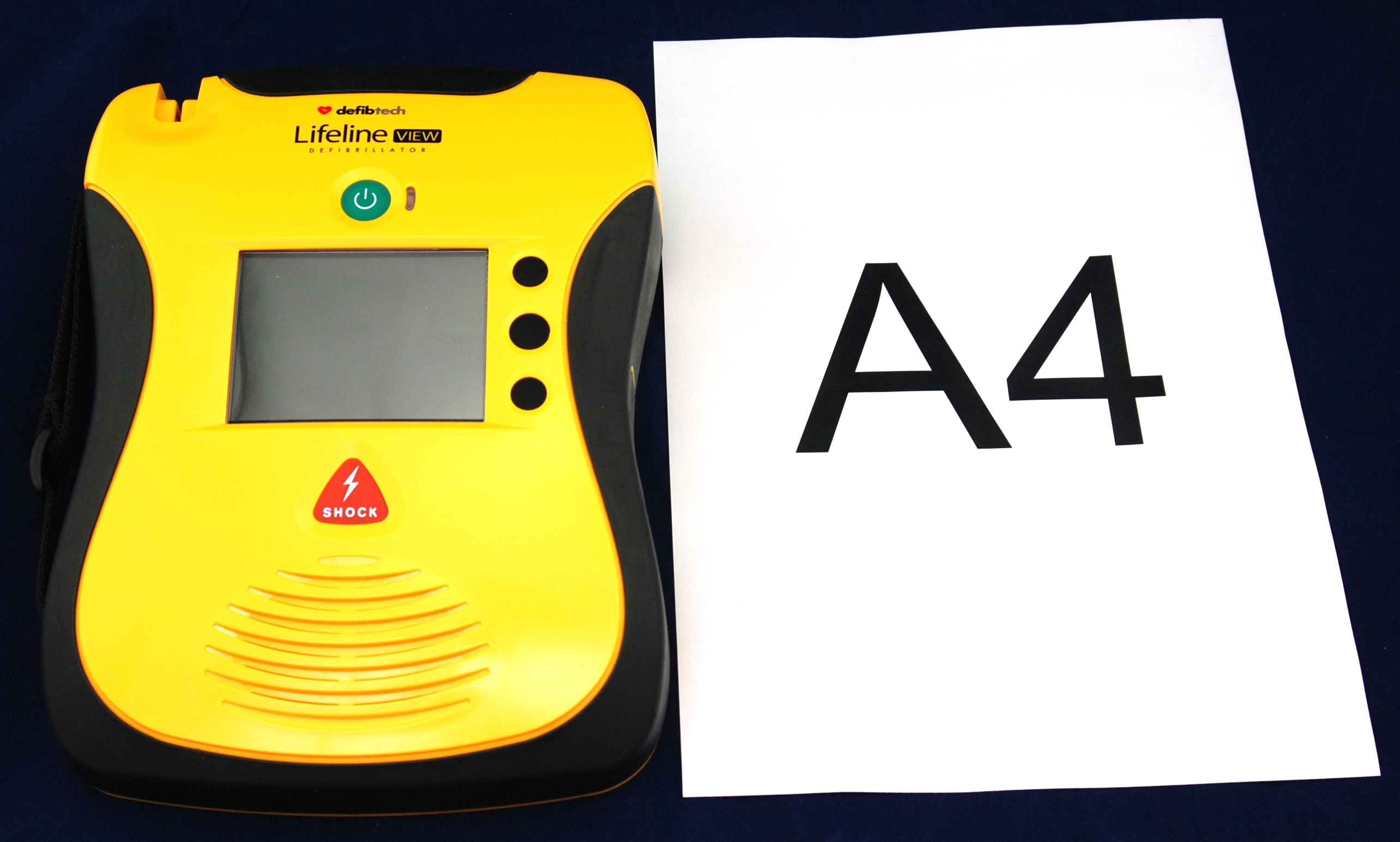 Halbautomatischer Defibrillator mit Display für visuelle Ausgabe der Anweisungen. Mit Größenvergleich